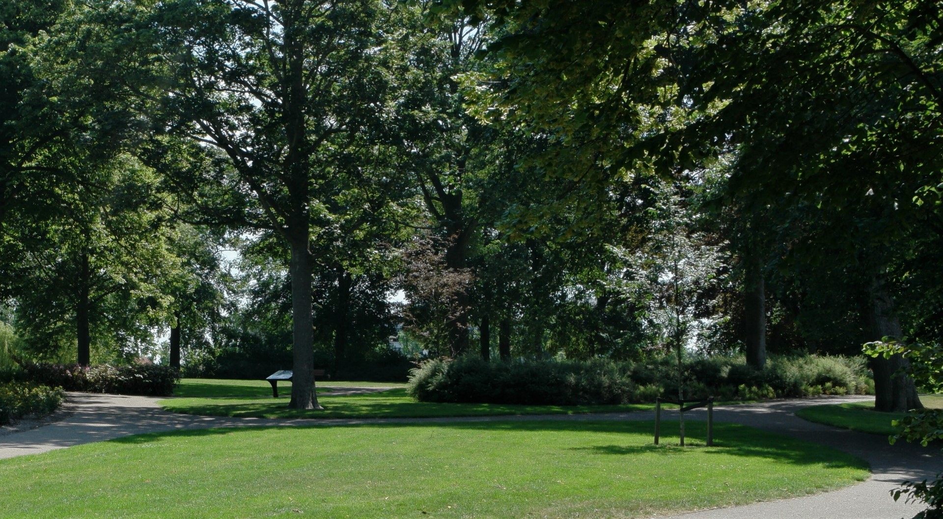 Engelse Tuin, een park in Harlingen